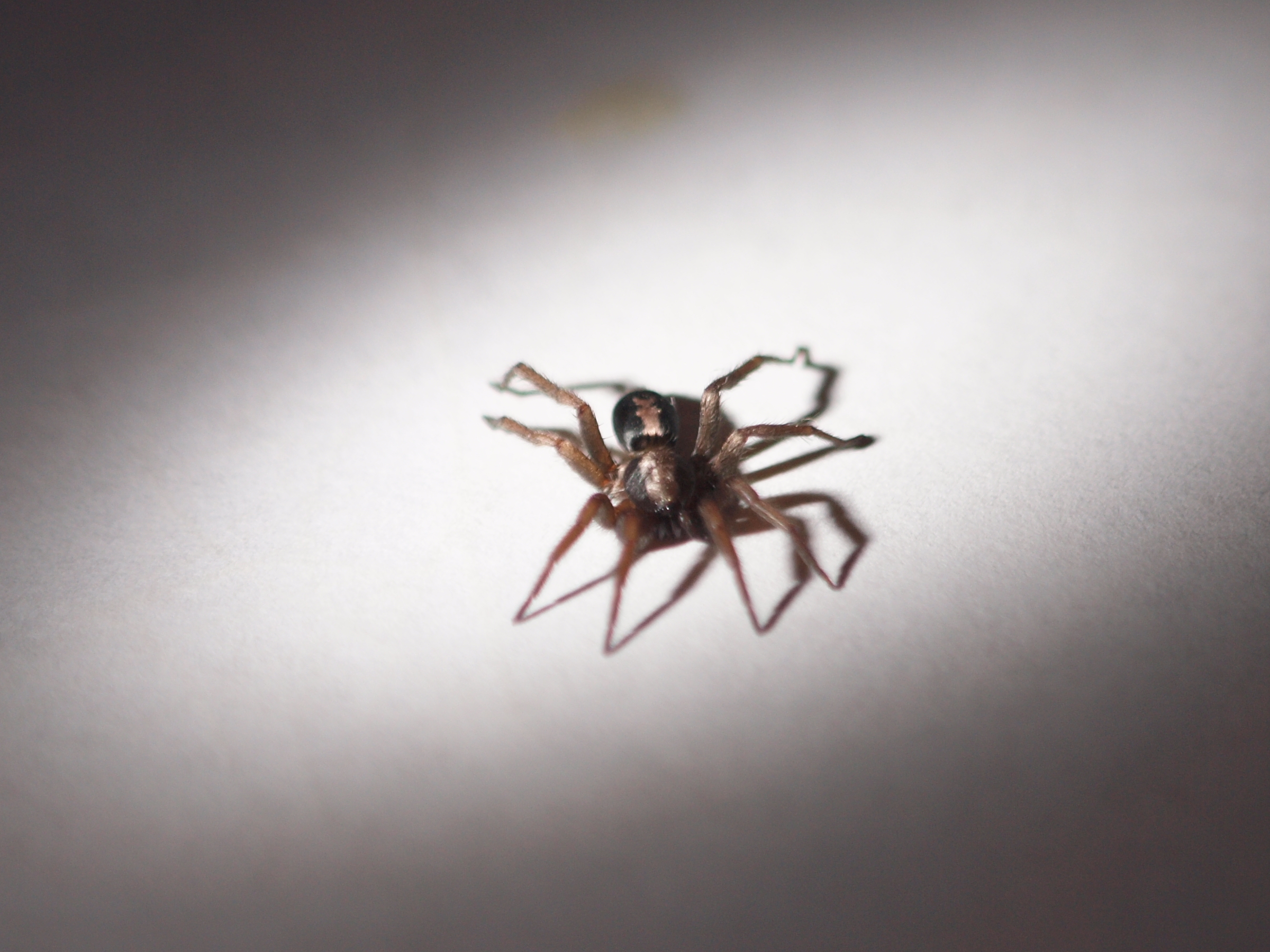 Western Parson Spider (Herpyllus propinquus)